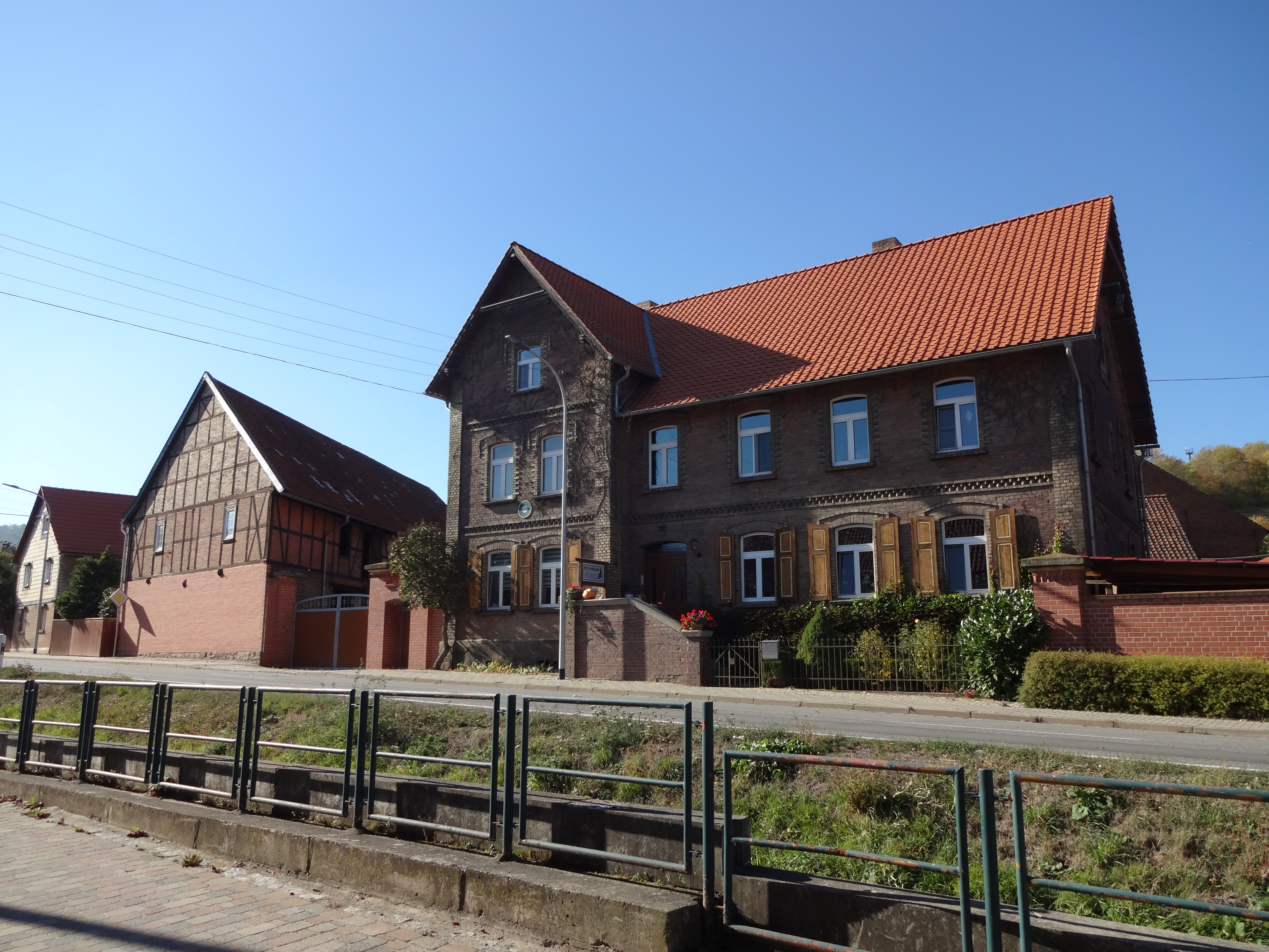 denkmalgeschützter Bauernhof in der Blankenburger Straße 13 in Benzingerode (Ortsteil von Wernigerode)